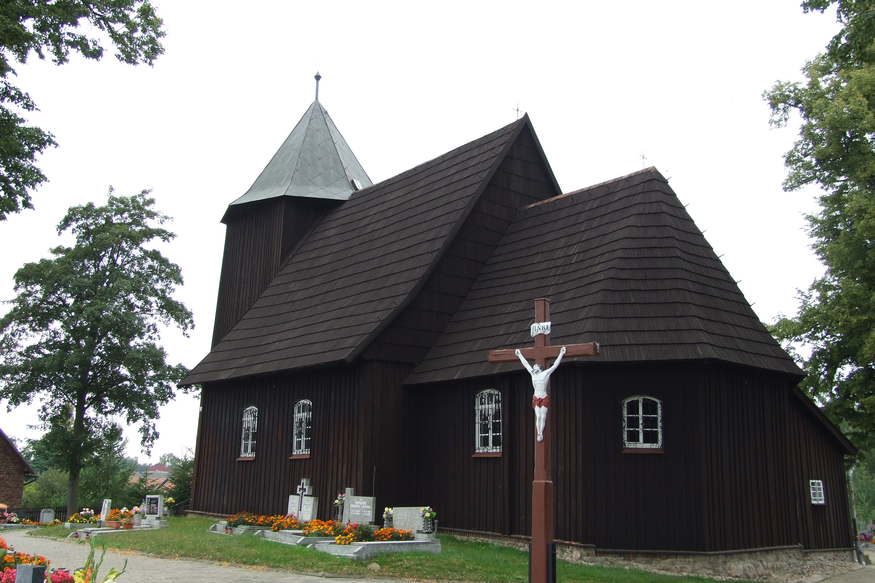 Kościół św. Marii Magdaleny w Boroszowie